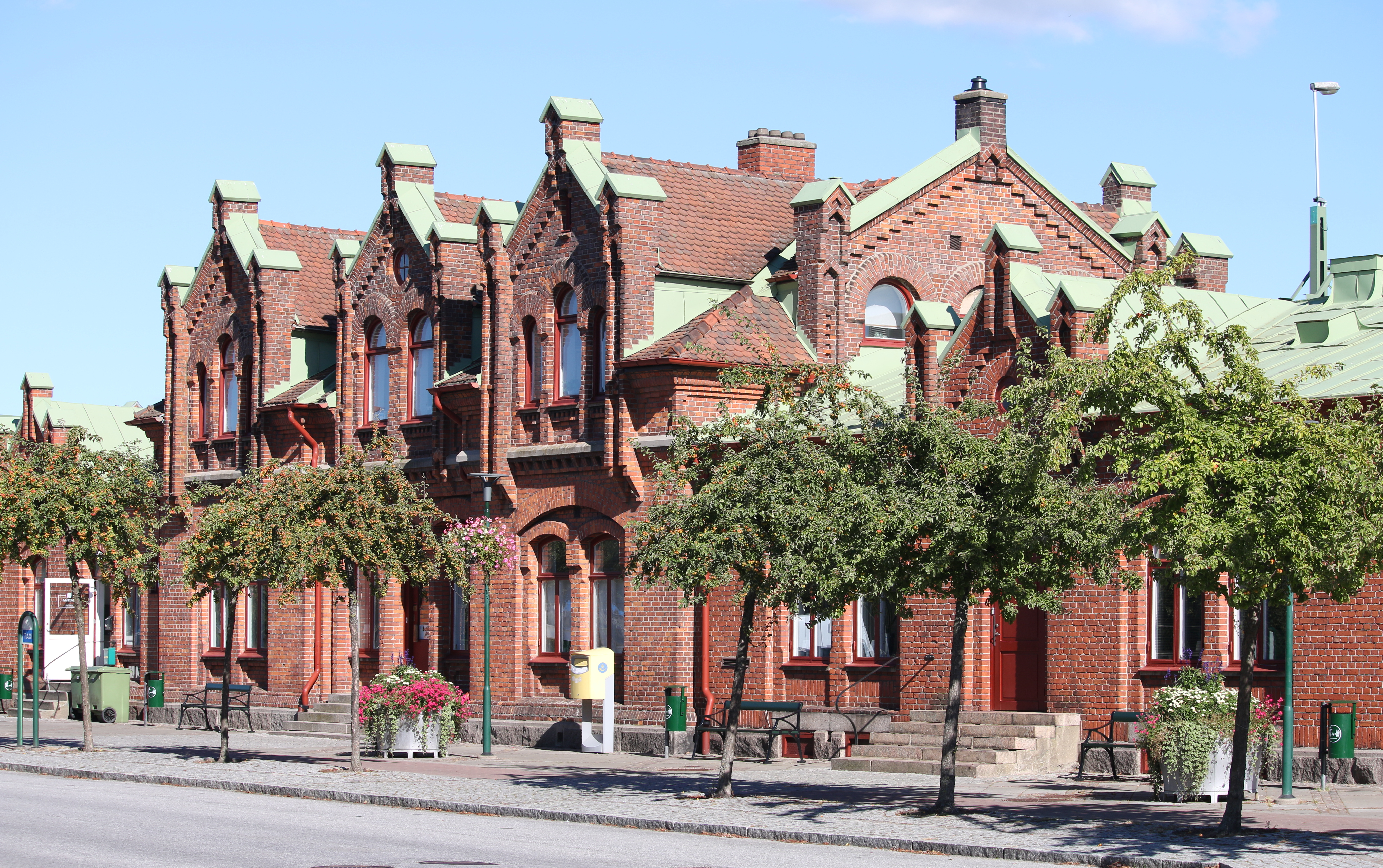 Kävlinge stationshus 2015